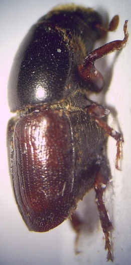 Imago von Scolytus scolytus. 40fache Vergrößerung, rechte Seite.